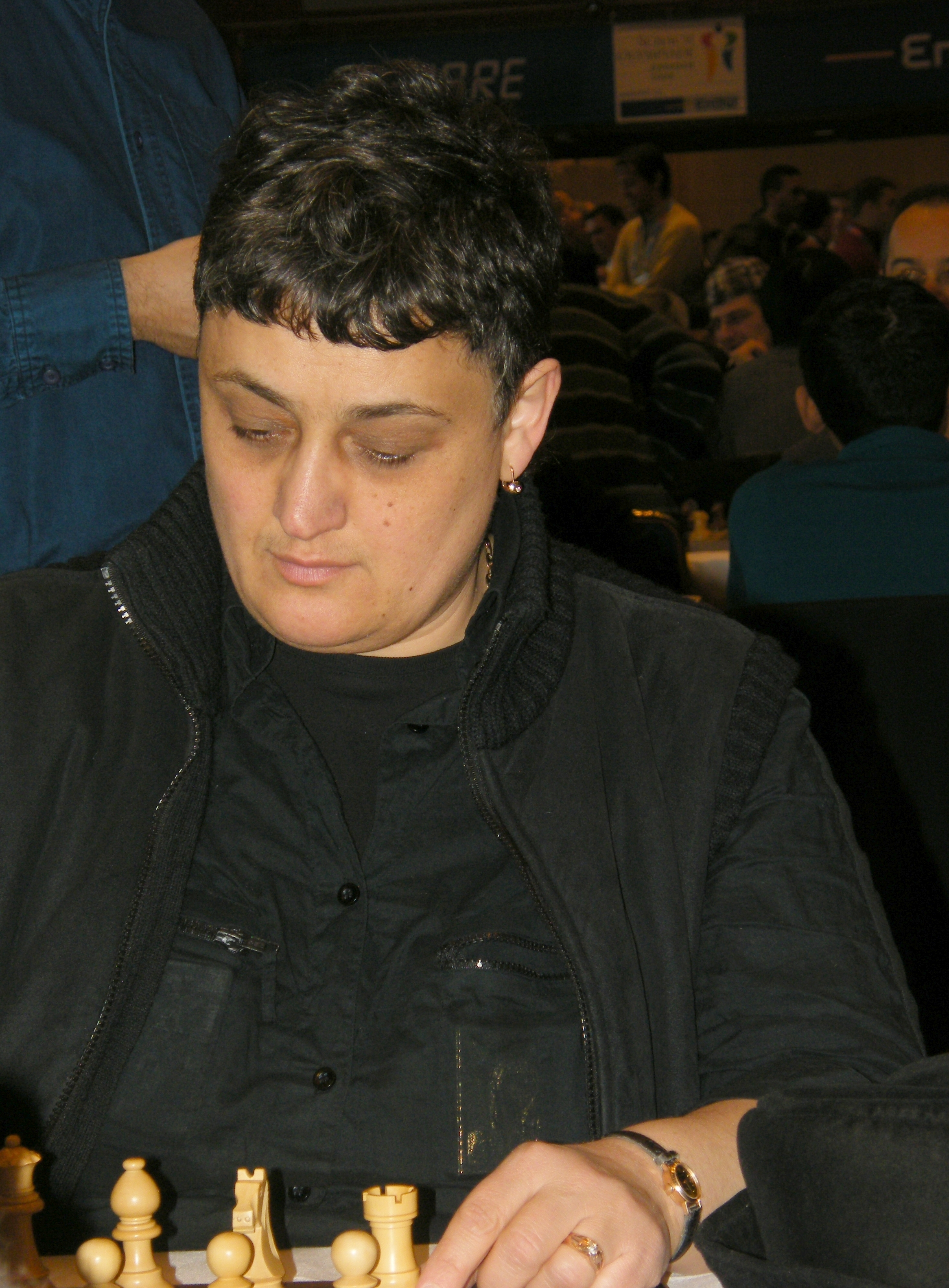 Maja Tschiburdanidse bei der 38. Schacholympiade in Dresden 2008